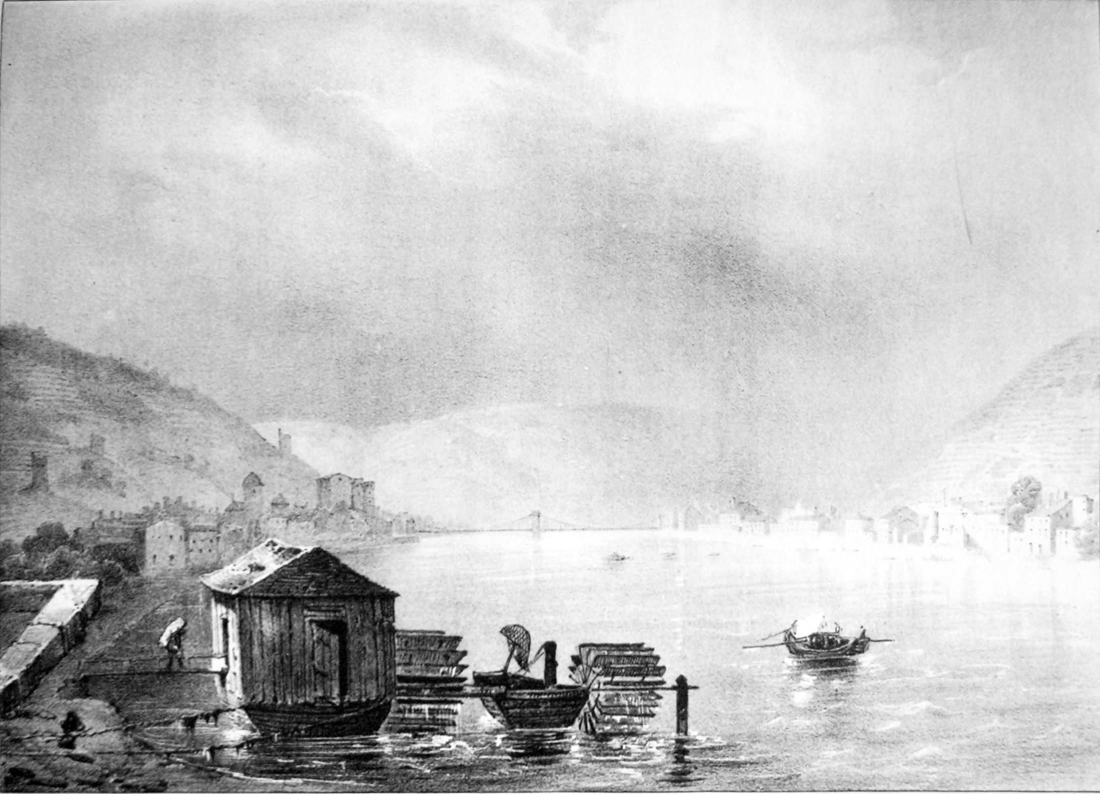 Tain (Drome) ATTENTION ! Ce facsimilé est réalisé en applicant des alterations avec un logiciel graphique à une copie numérique, obtenue à partir d'une prise de photo faite par un non-professionnel. Elle pourrait ne pas être parfaitement réussie.